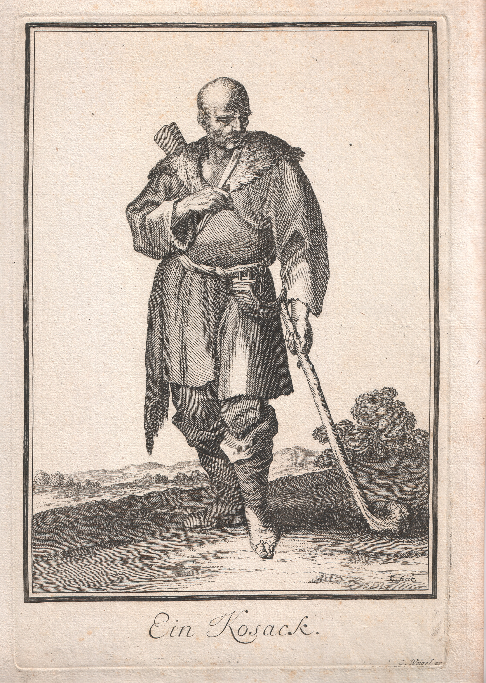 Neu-eröffnete Welt-Galleria. ..., Nürnberg 1703. 71. Ein Kosack.